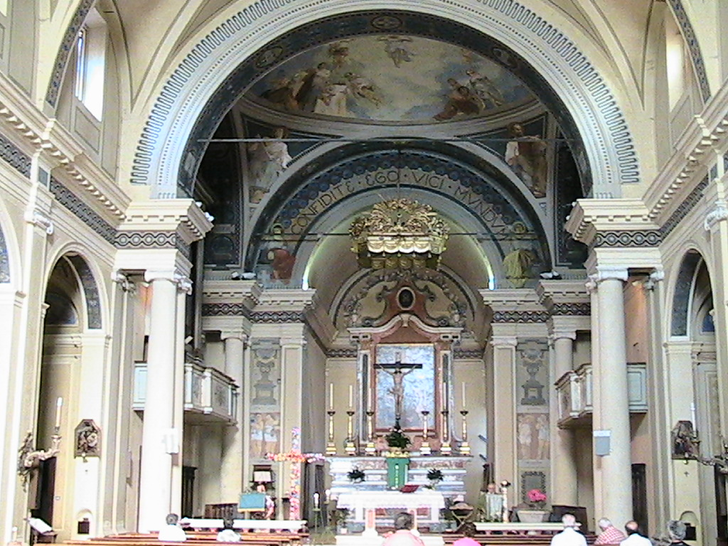 Rivarolo Mantovano - Chiesa parrocchiale di Santa Maria Annunciata - interno